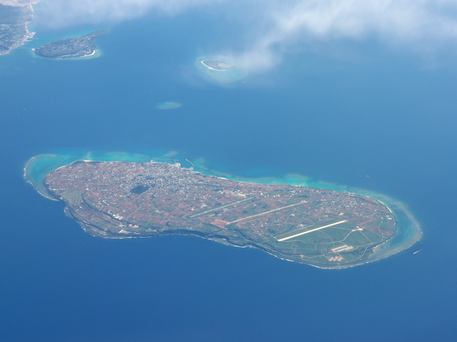 伊江島（沖縄県）